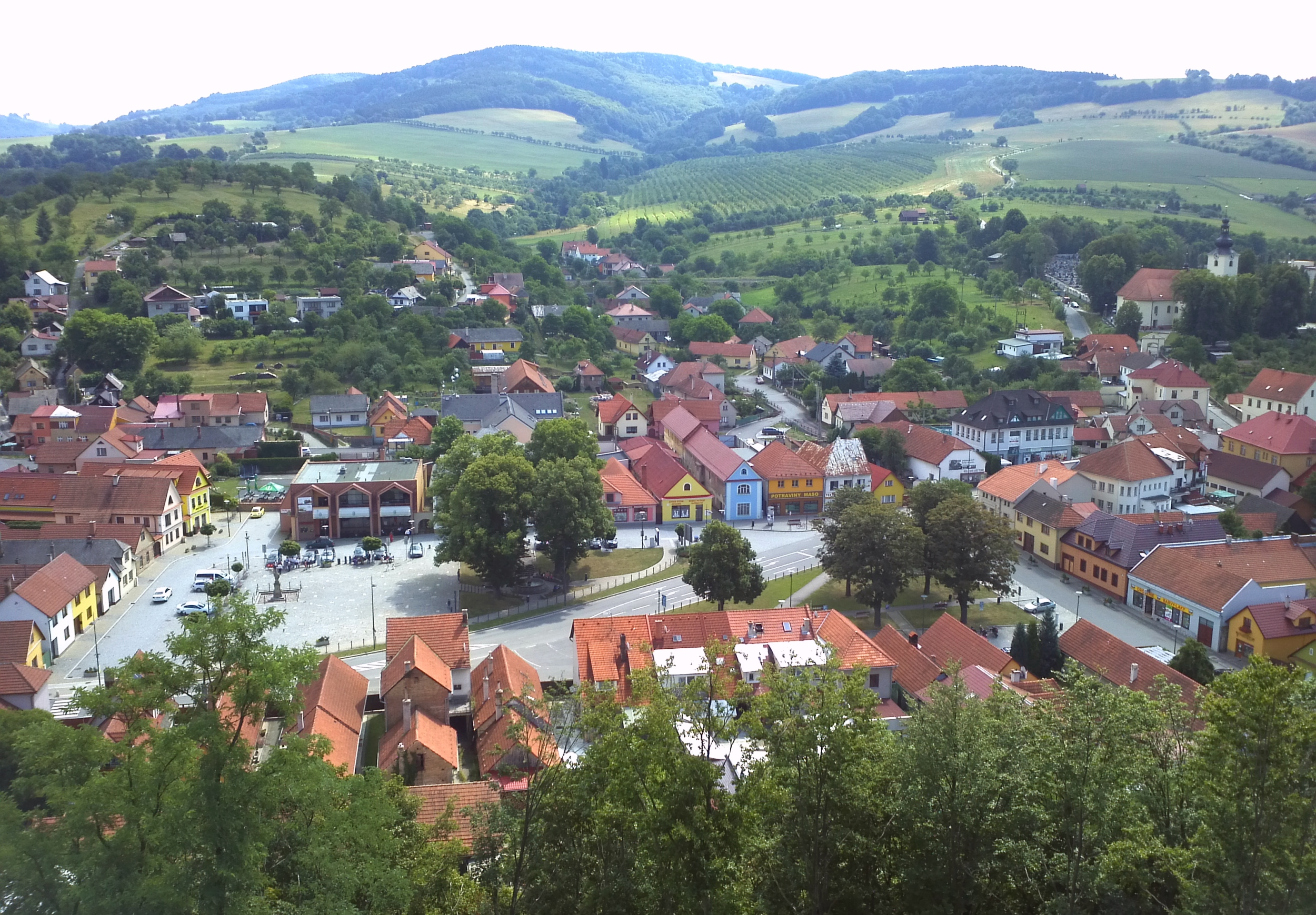 Brumov-Bylnice - centrum Brumova, pohled z hradu